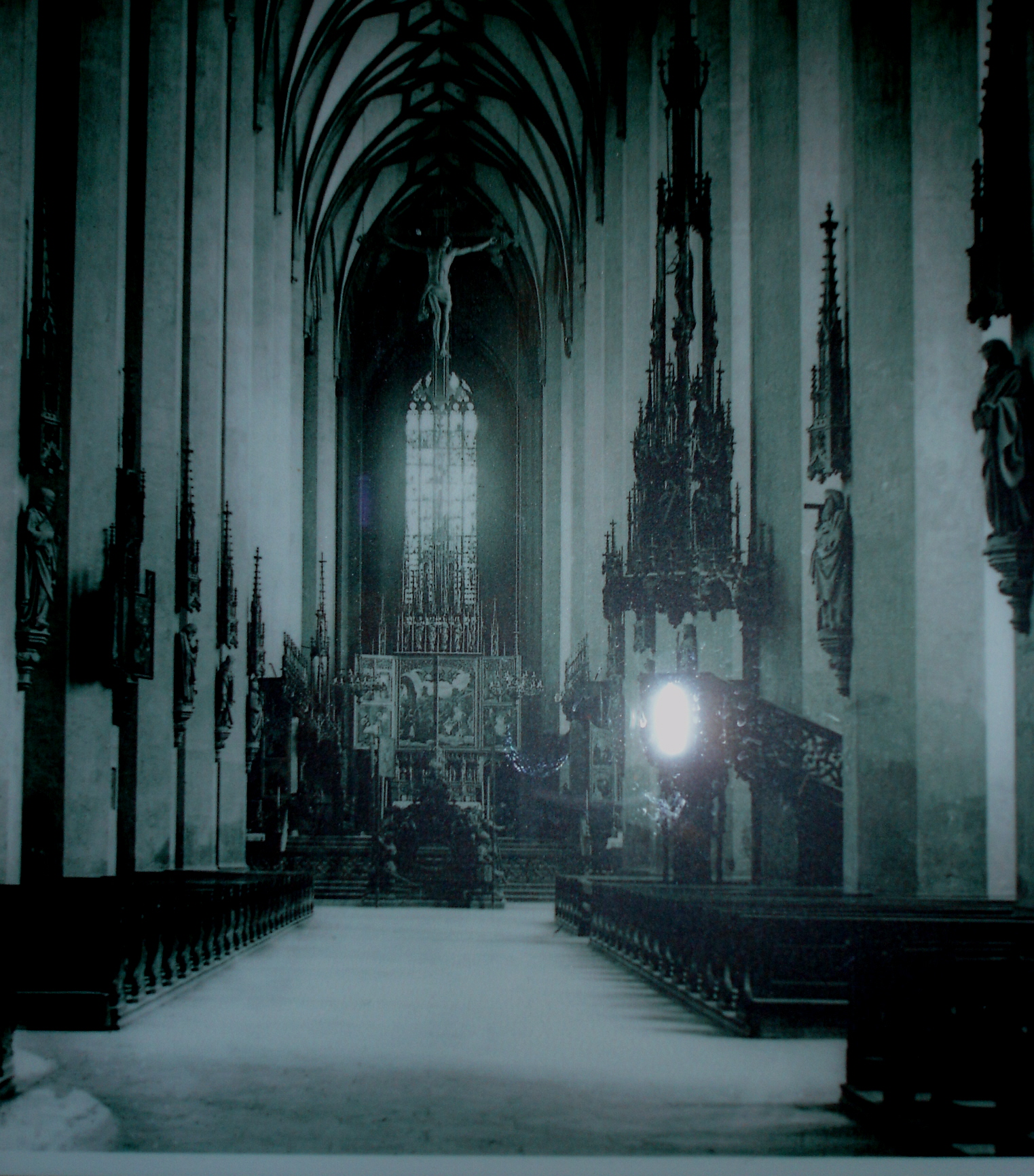 Bild nach der Umgestaltung 1870